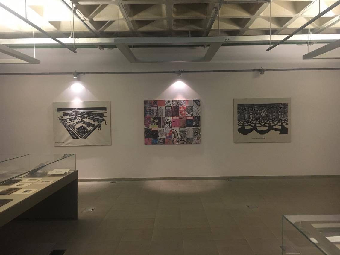 Sala de exposições do andar de baixo.